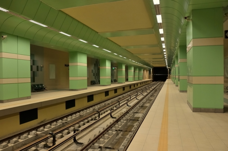 Метростанция "Княгиня Мария Луиза"